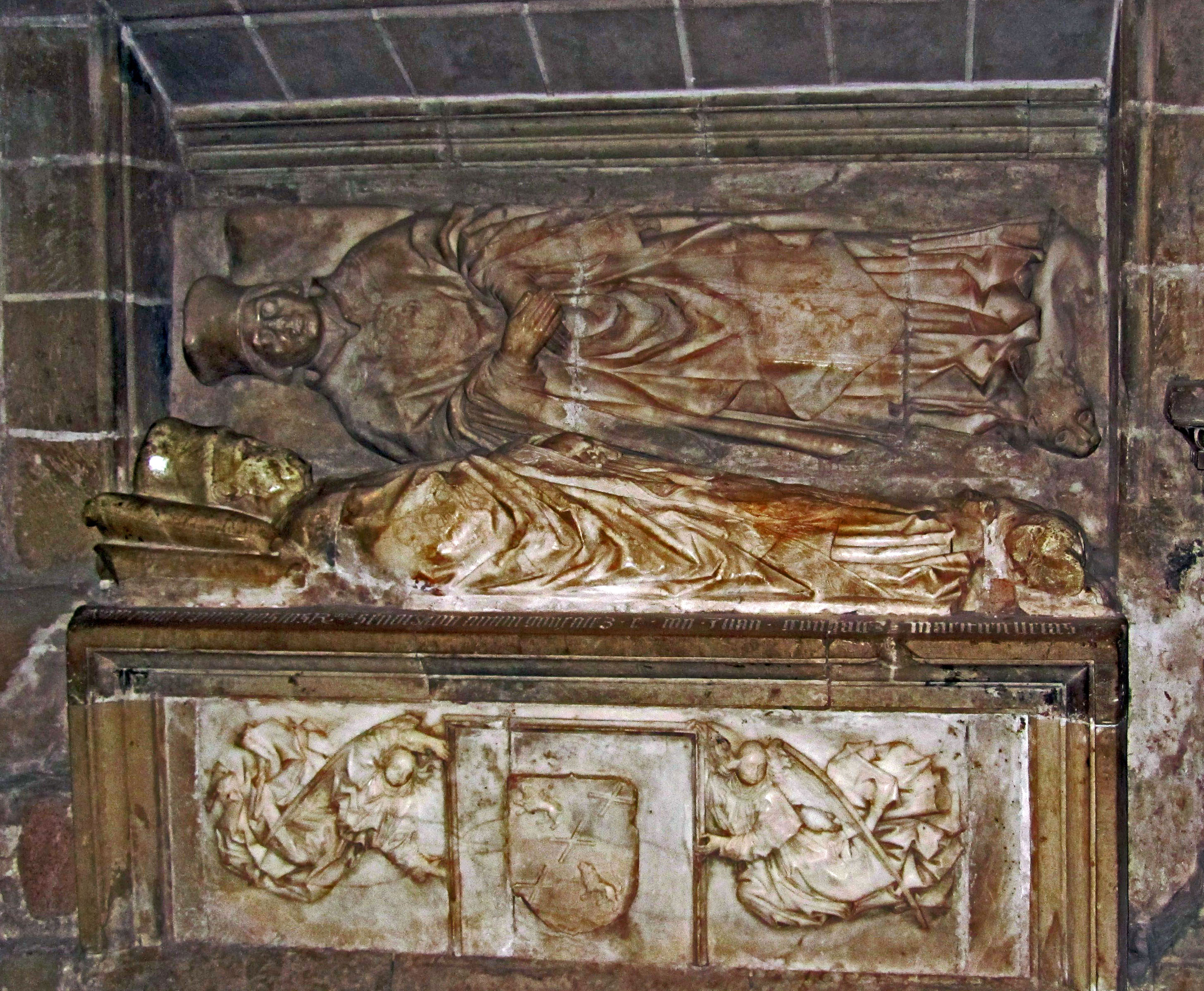 Sepulcro de González Menjúa en la catedral de Sigüenza.Spain